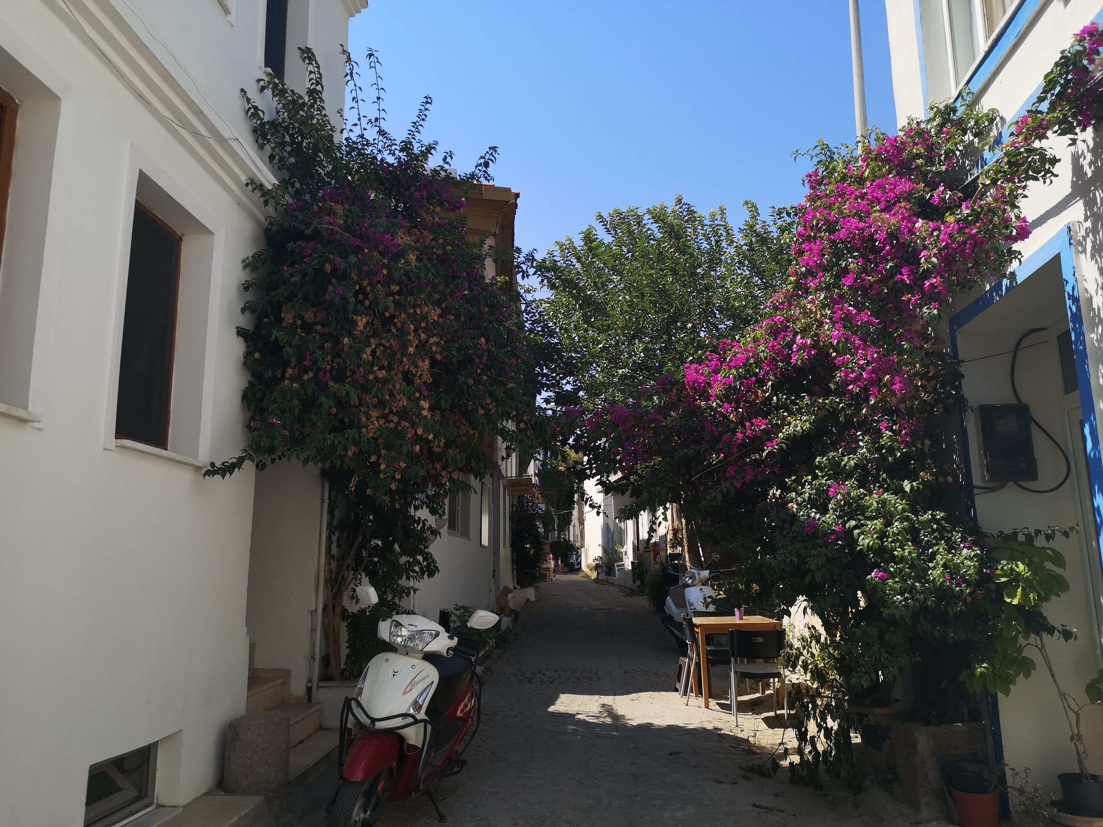 Bozcaada, Çanakkale, 2019